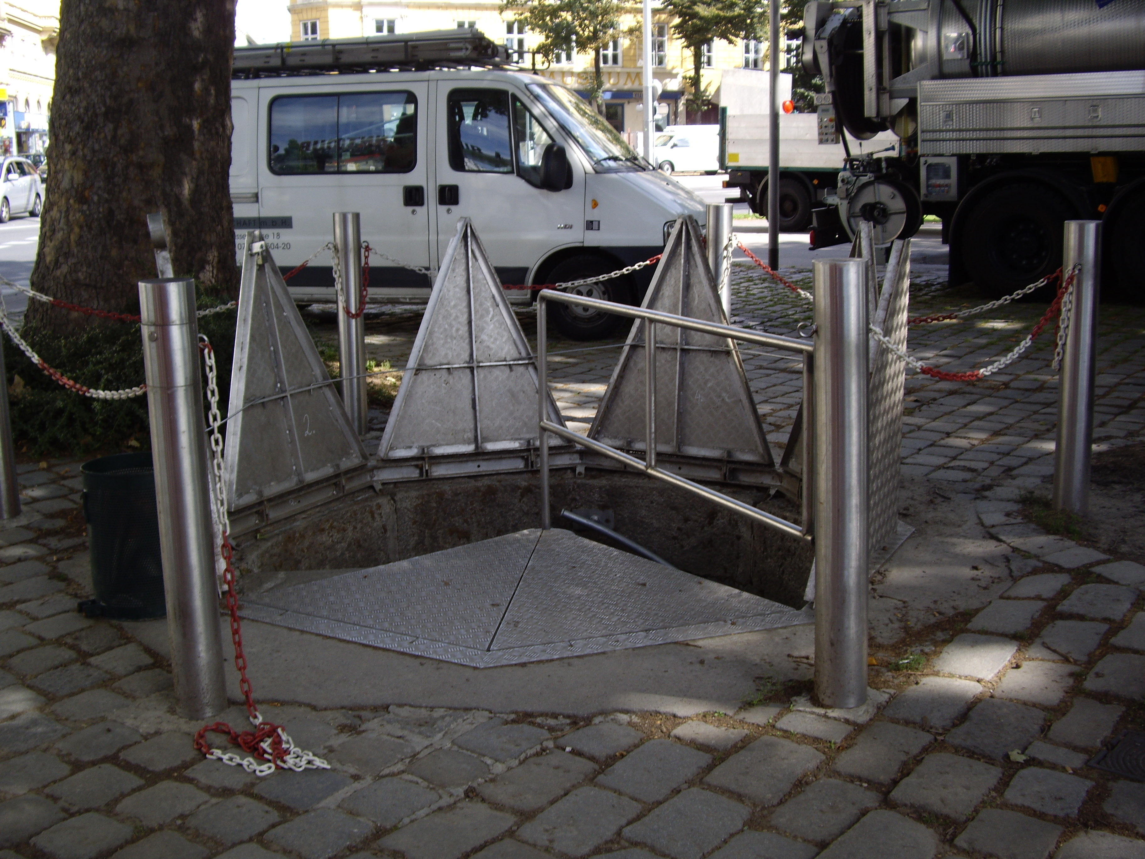 Malsuprenenirejo de la Viena Kanalizado en la Esperanto-Parko.